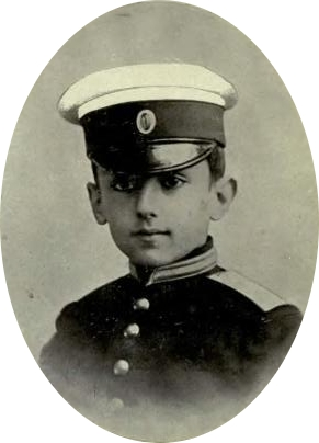 Pedro I de Serbia de niño.